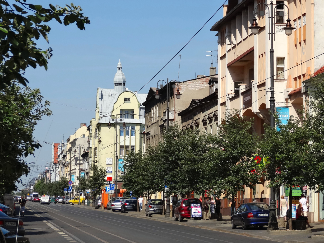 Ulica Gdańska w Bydgoszczy na odcinku między ul. Śniadeckich, a ul. Cieszkowskiego